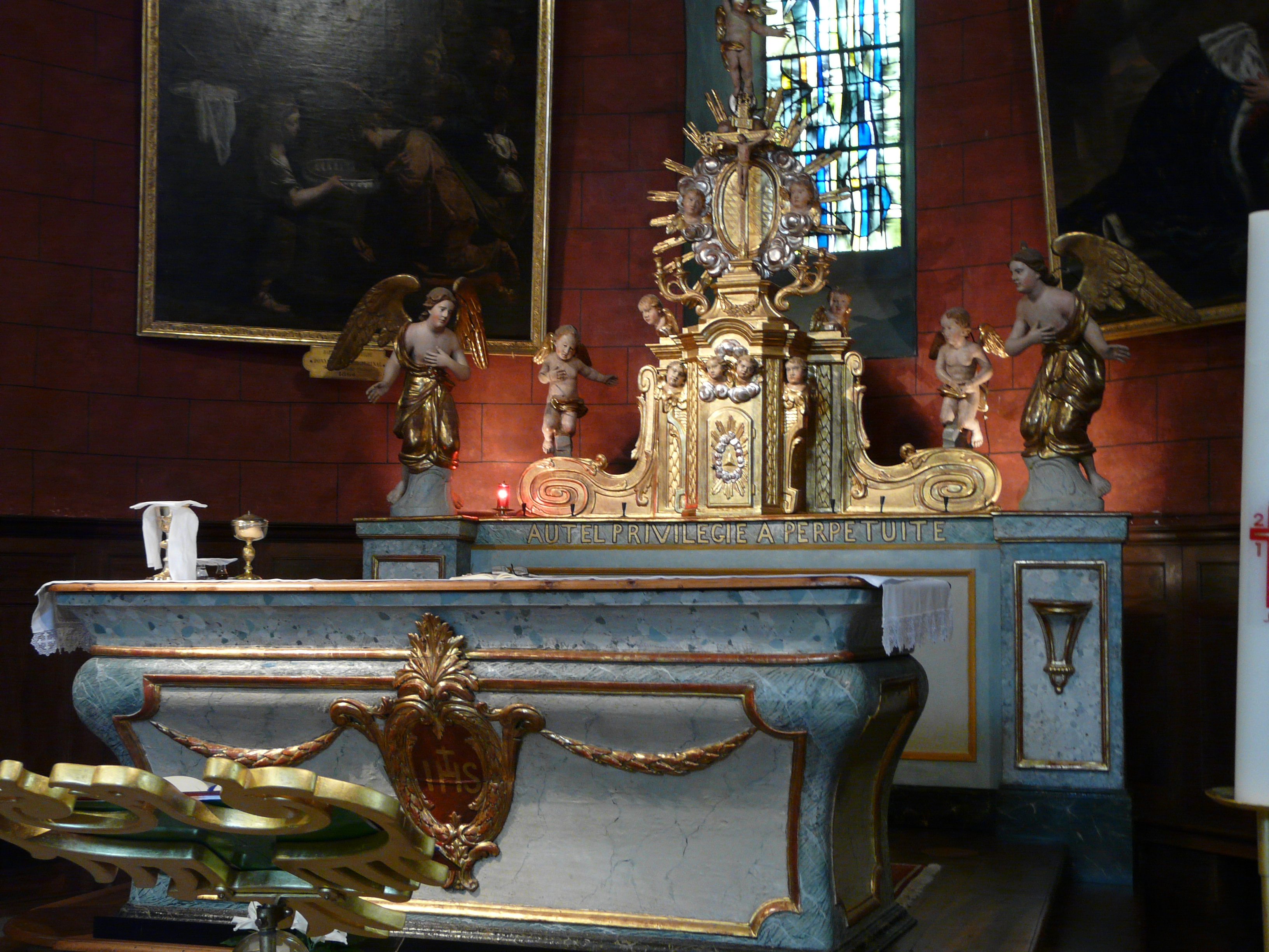 Autel de l'église Saint-André, dite « des Templiers », Luz-Saint-Sauveur, Haute-Pyrénées, France.